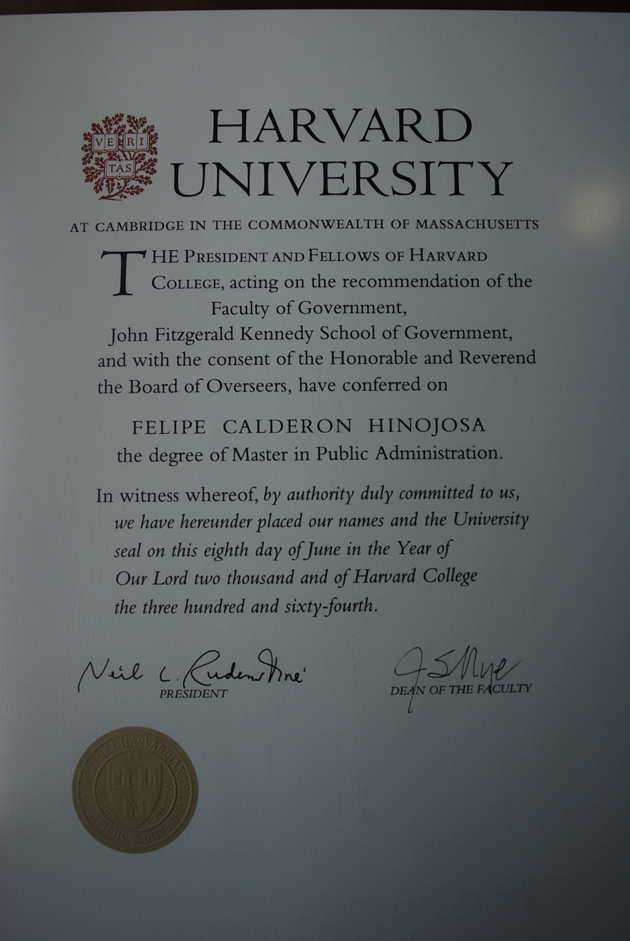 Título de la Maestría